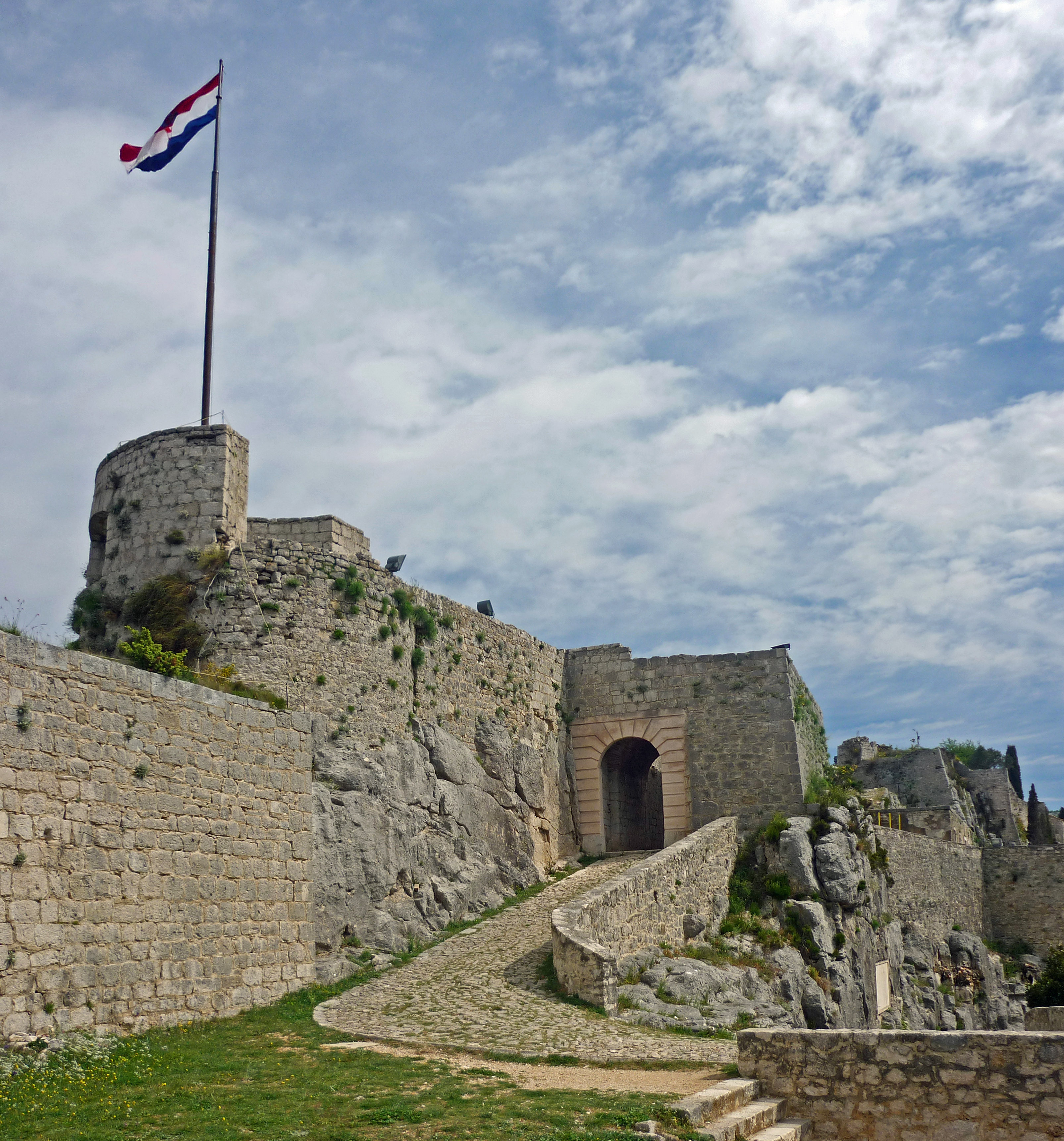 Festung Klis (Clissa), von 1537 bis 1648 türkisch: Turm Oprah mit kroatischer Flagge, Vorhof und zweites Burgtor